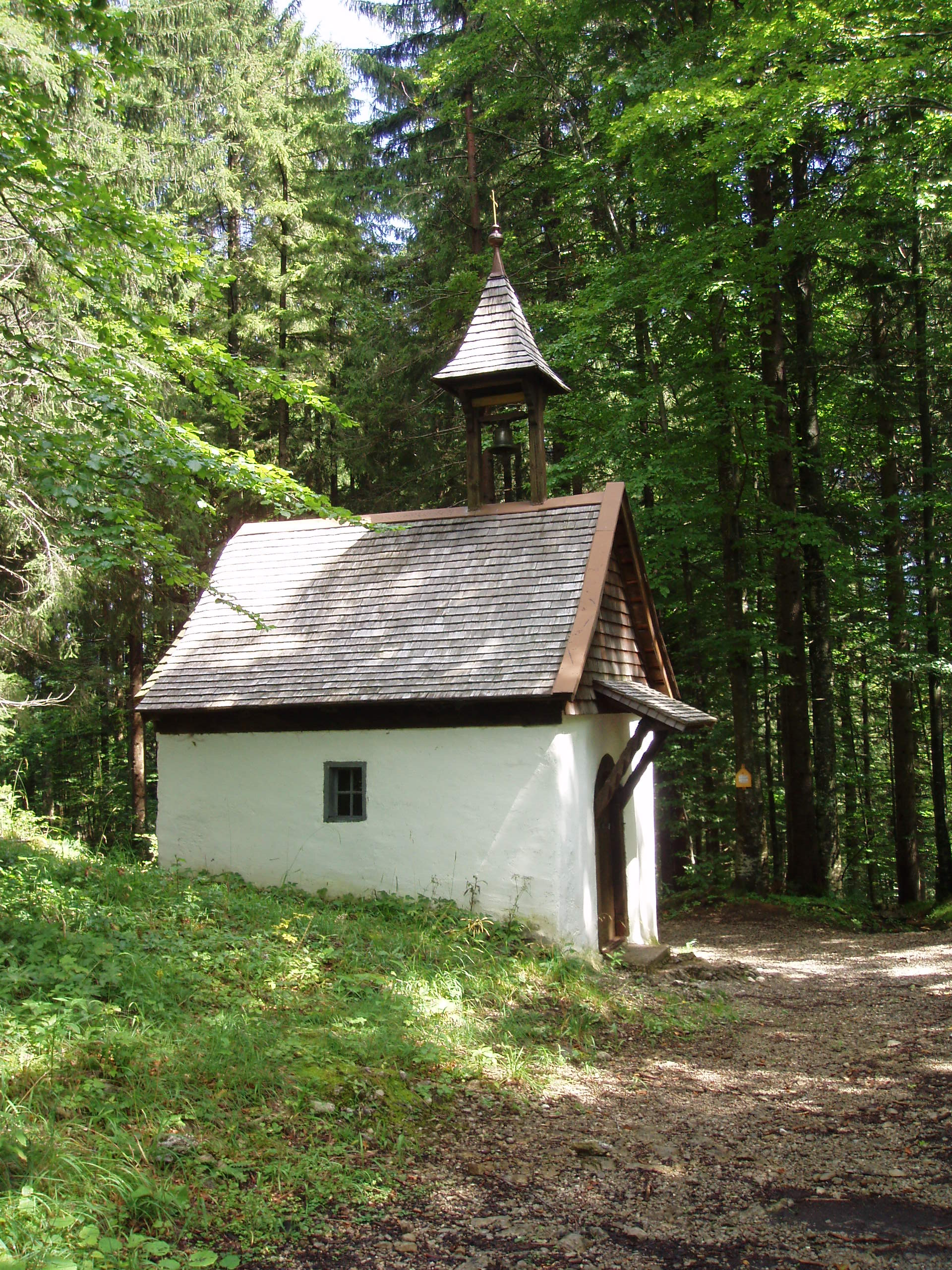 Hornkapelle oberhalb von Bruck im Ostrachtal